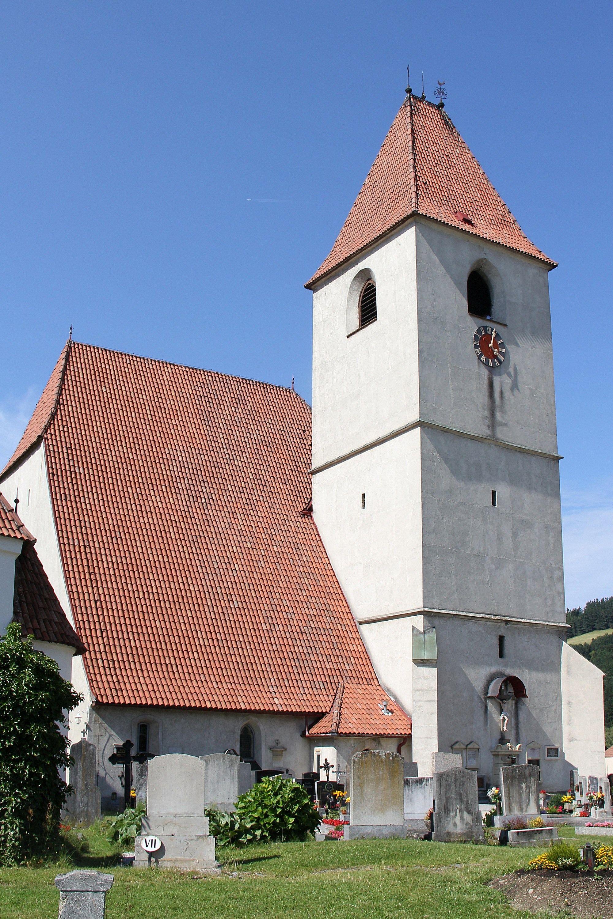 Denkmalgeschützte katholische Pfarrkirche im Ortsteil Unteraspang in Aspang-Markt Object location47° 34′ 12.76″ N, 16° 05′ 56.71″ E